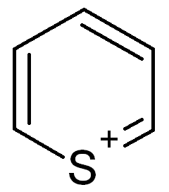 Thiopyryliumion (structuurformule)